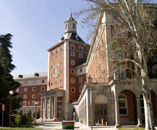 Rectorado de la Universidad Complutense de Madrid. Ciudad Universitaria.